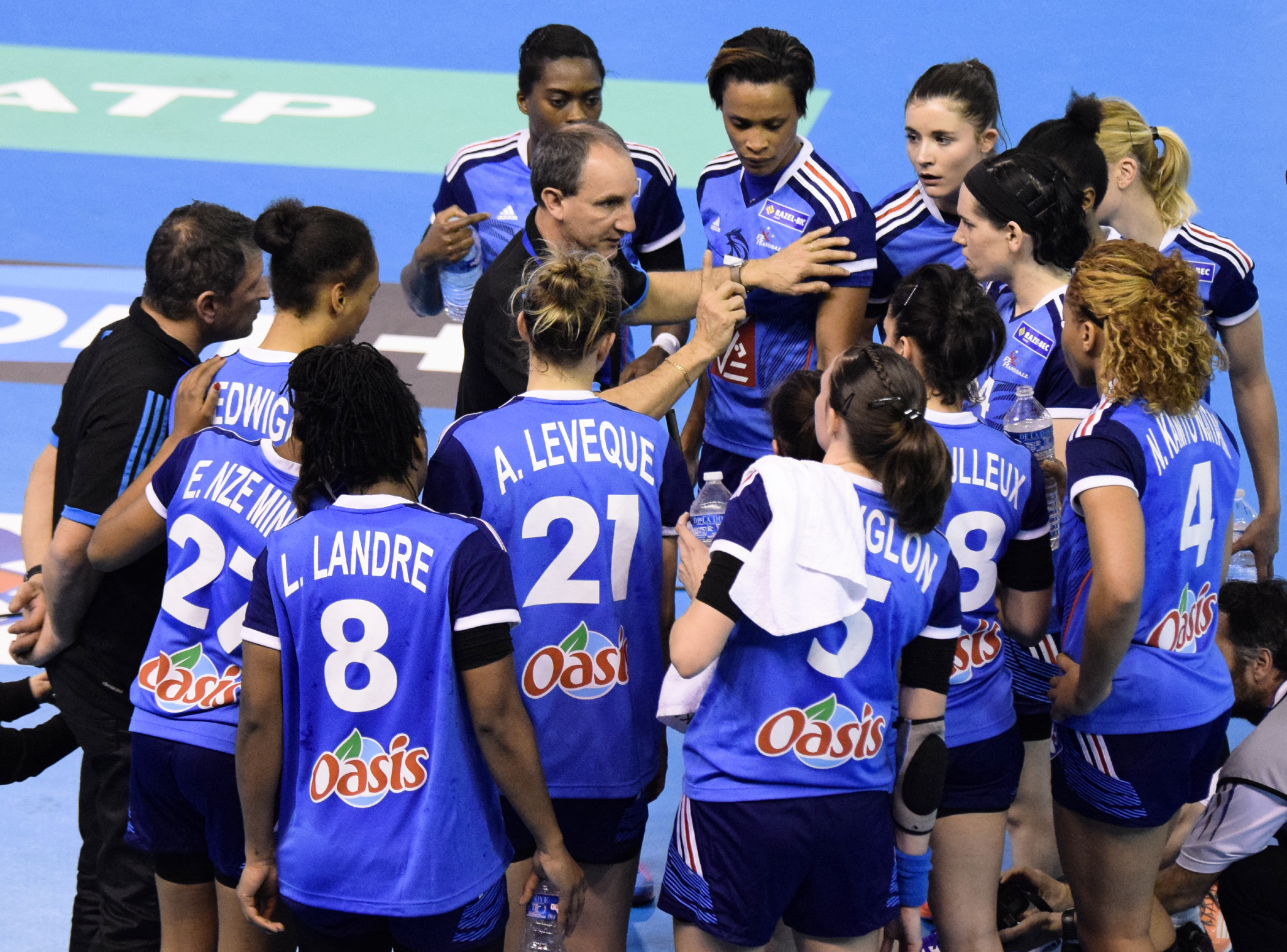 Rencontre entre la France et le Danemark lors de la Golden League 2015. A Dijon, le 19 mars 2015.